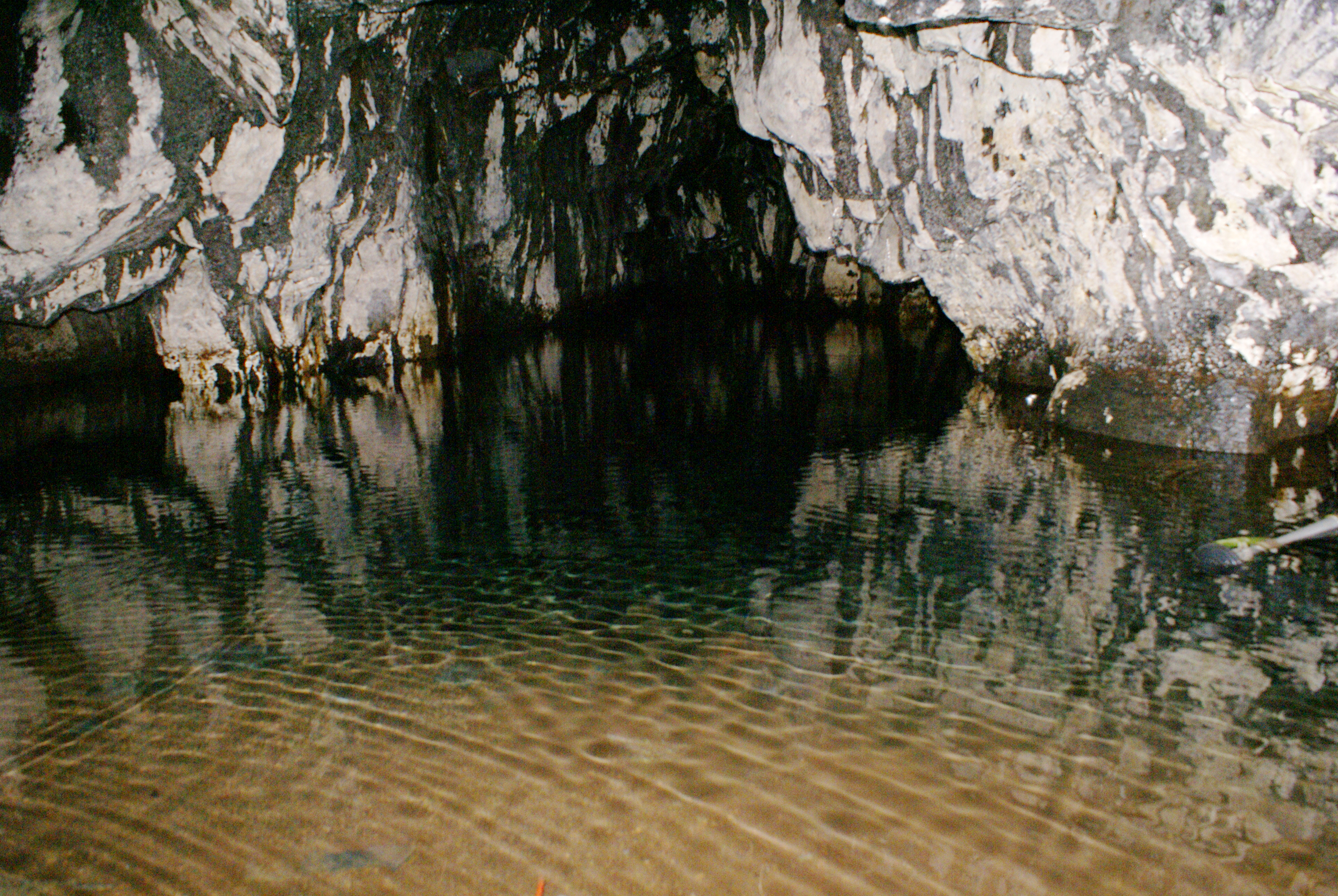 Furna do Poio, Ateção à marca das marés, Caldeira de Santo Cristo, Calheta, ilha de São Jorge